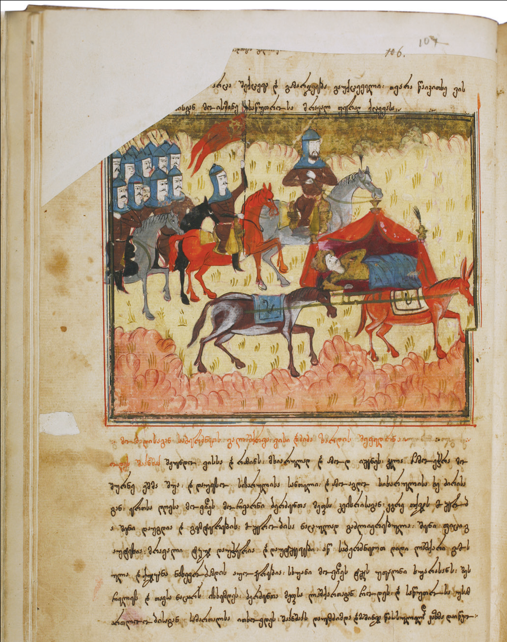 ვისრამიანი (S-3702)